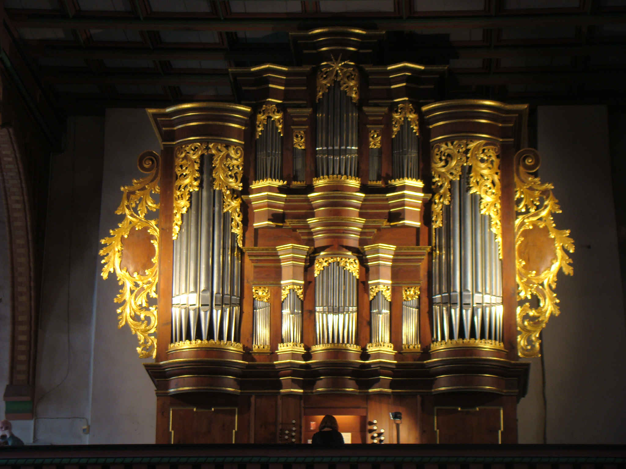 Stadtkirche St. Johannis (Neustadt an der Orla)